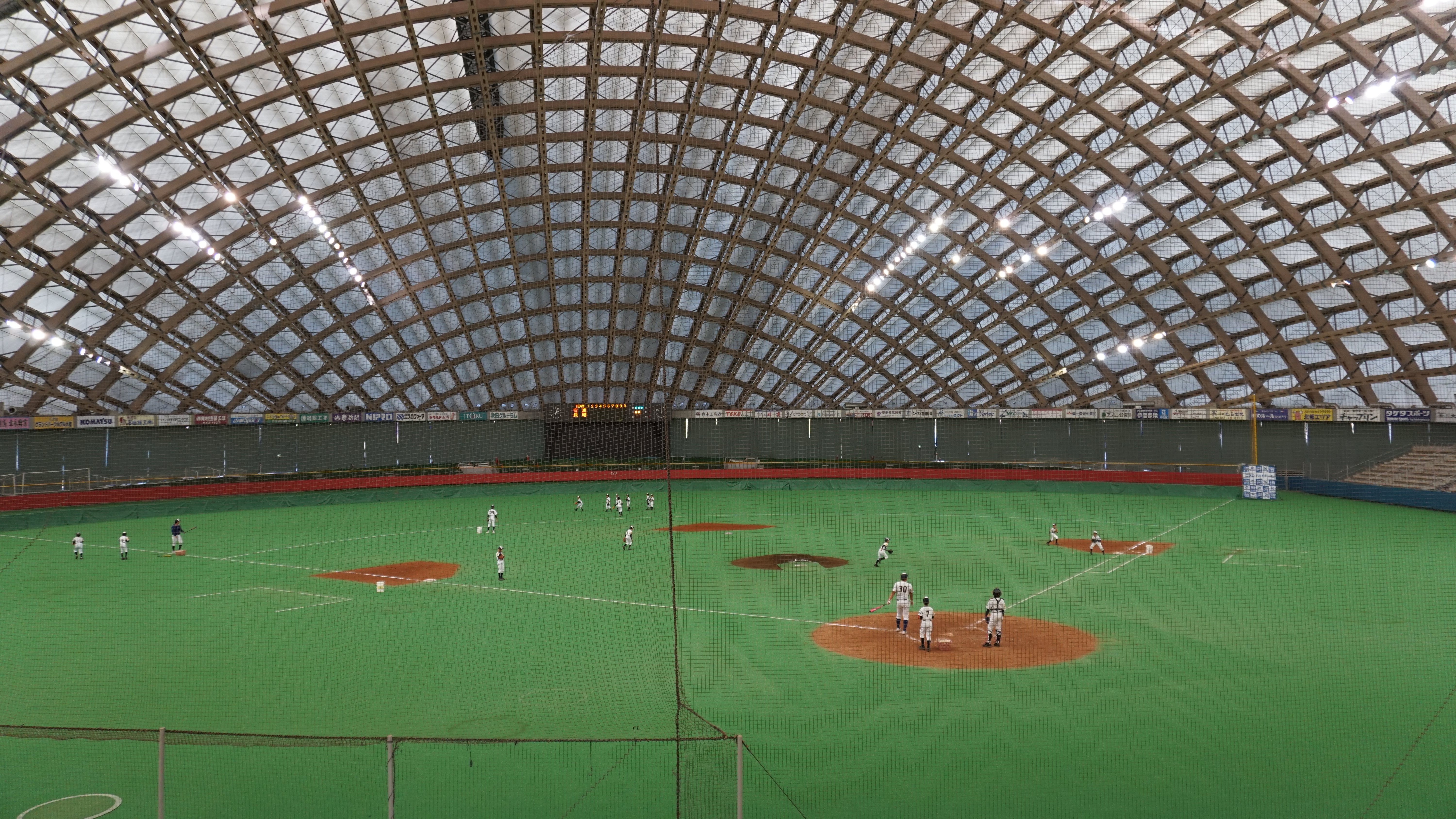 大館樹海ドーム（ニプロハチ公ドーム）